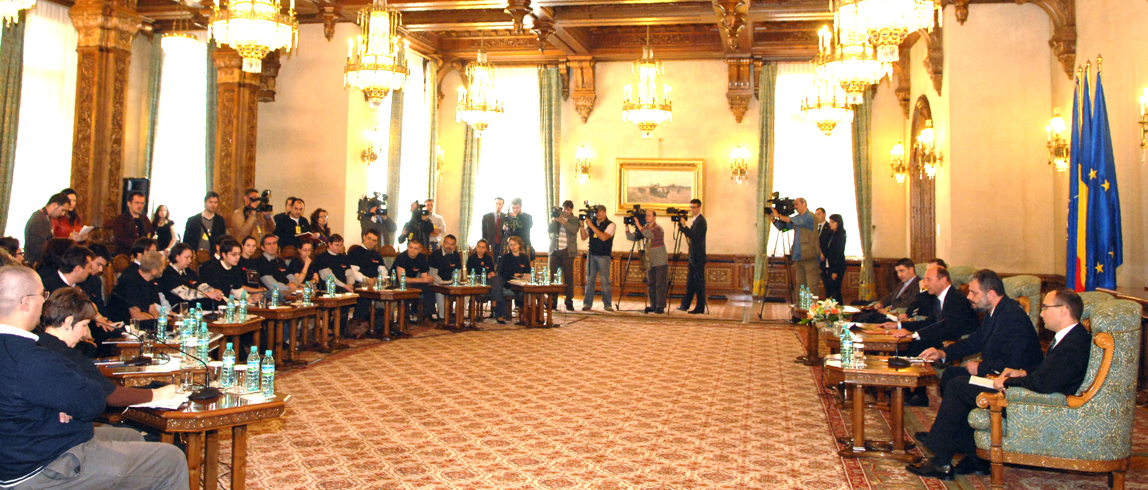 Coaliția «Opriți Codurile!», întâlnire cu Președintele României